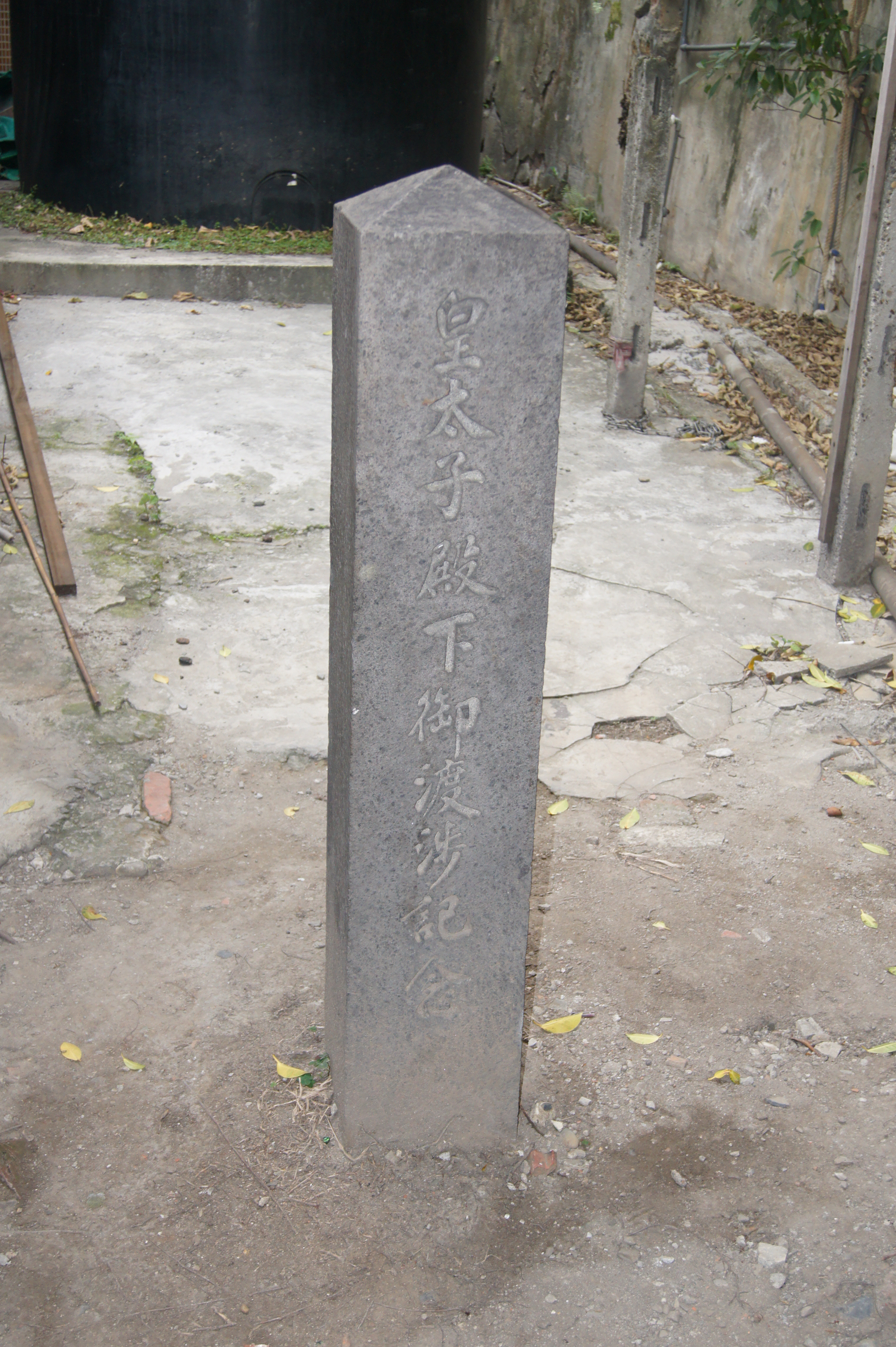 瀧乃湯 (台湾)に有る碑。皇太子時代のja:昭和天皇が来訪した事を示す。